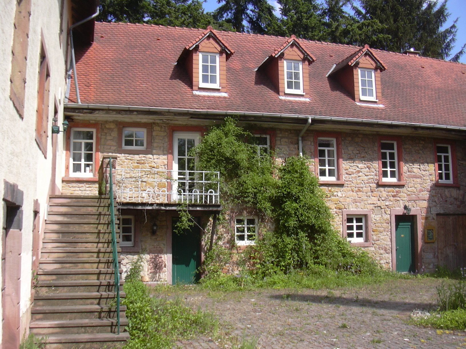 Felsenmühle (former water mill), Neuleiningen-Tal, Germany